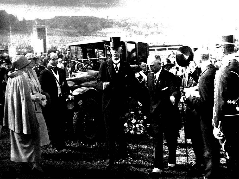 Gustav V på väg till invigningen av Damolympiaden augusti 1926